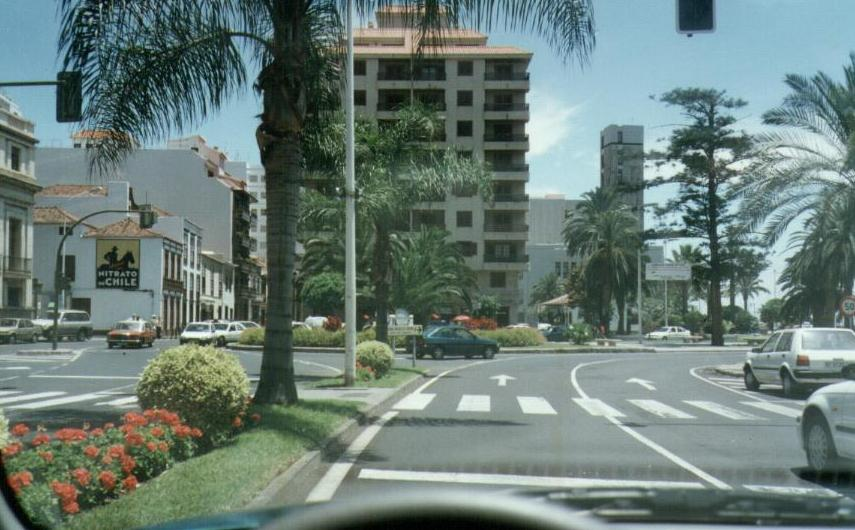 Entrada sur de la ciudad de Santa Cruz de la Palma (España). Autor: Fev